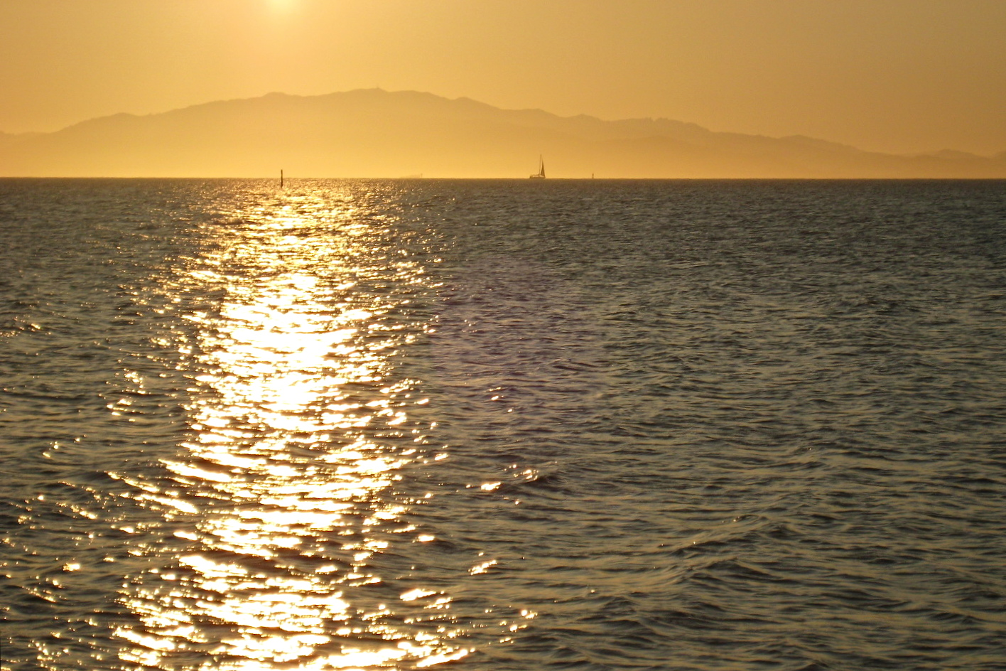 Richmond, CA